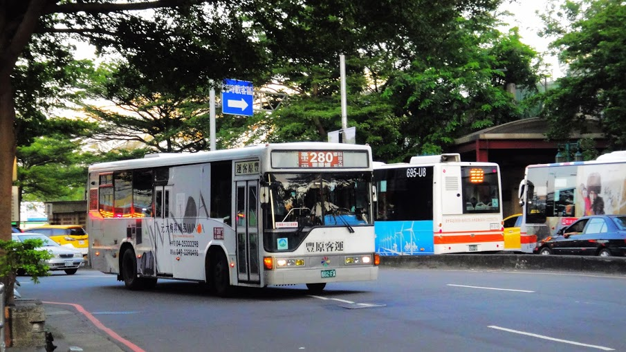 豐原客運 652-FX